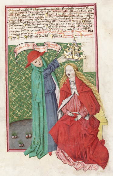 kardinál korunuje nevěstku papežskou tiárou, vyobrazení z Jenského kodexu